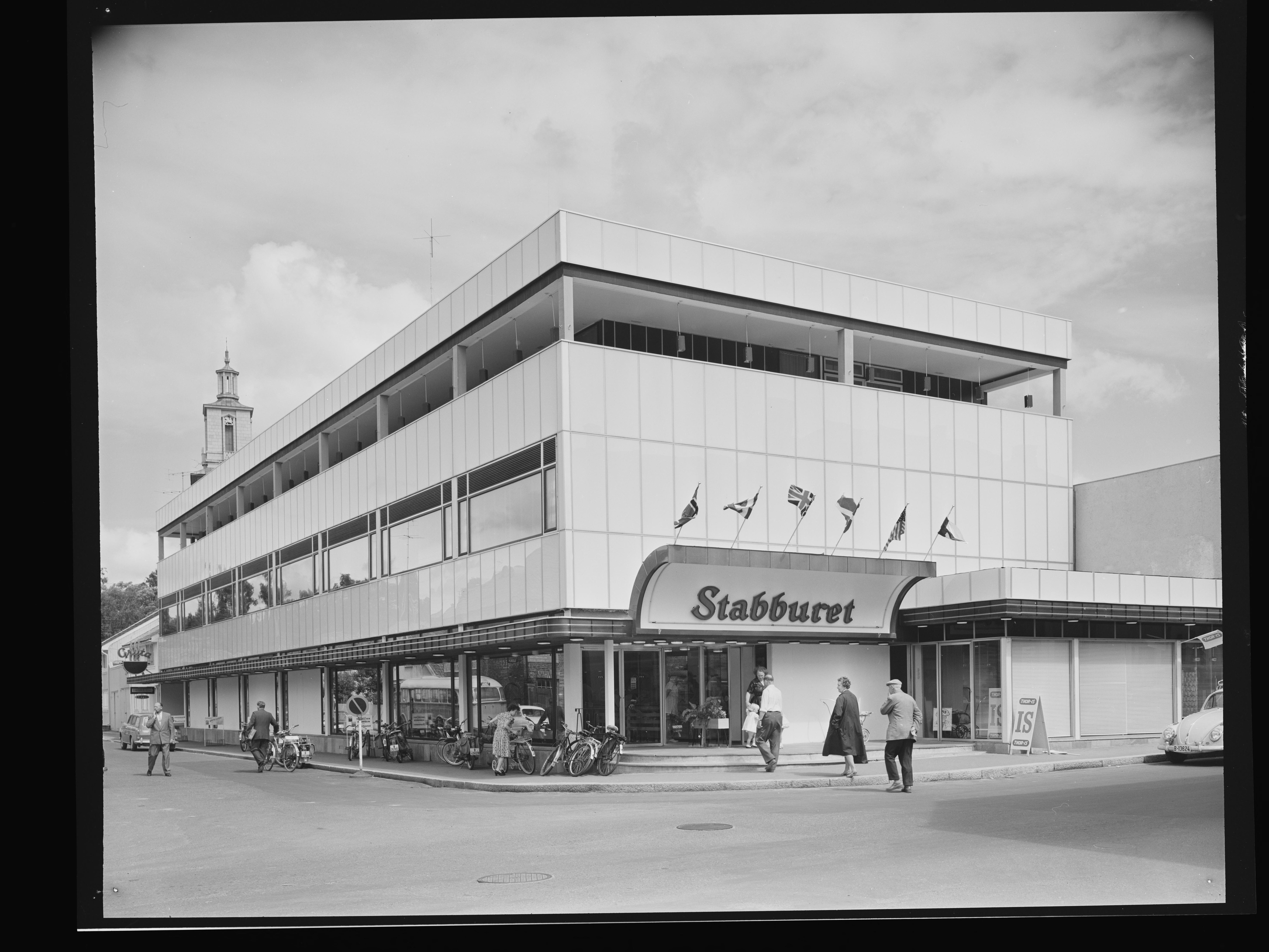 Bildet er hentet fra Nasjonalbibliotekets bildesamling Fredrikstad, Fredrikstad, Østfold